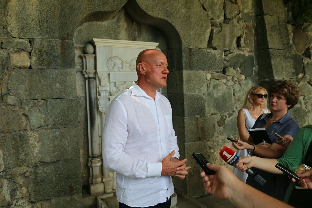 Нахлупин в Воронцовском дворце